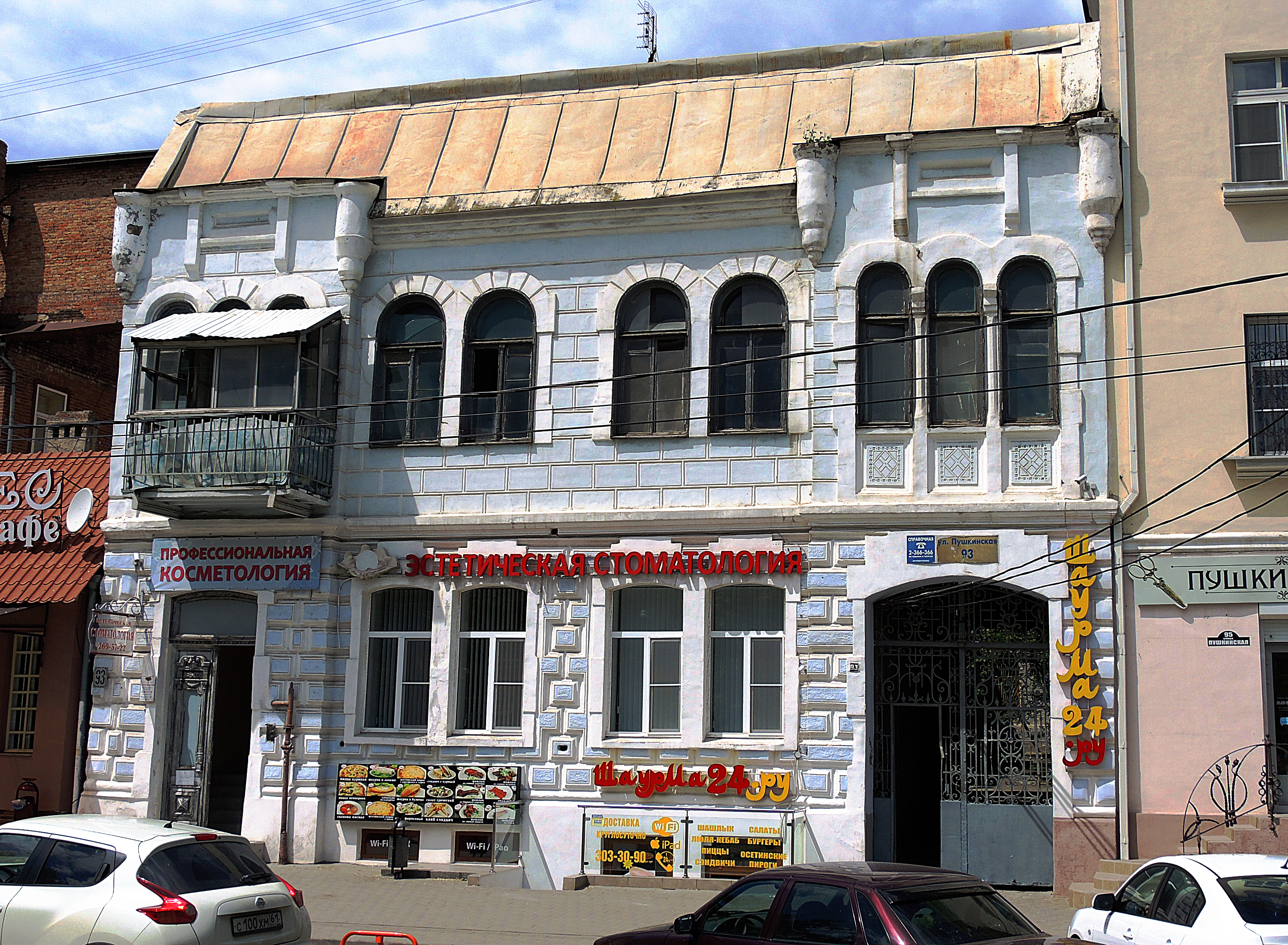 Жилой дом М.Г. Гавалла: улица Пушкинская, 93, литер А, Ростов-на-Дону, Ростовская область